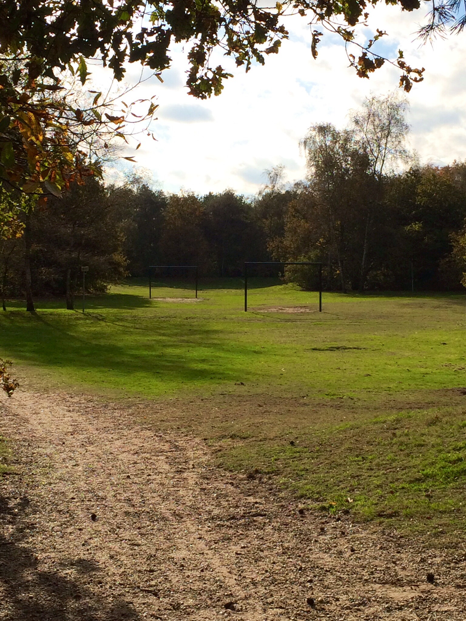 Een grasveldje in de Helmondse wijk Rijpelberg